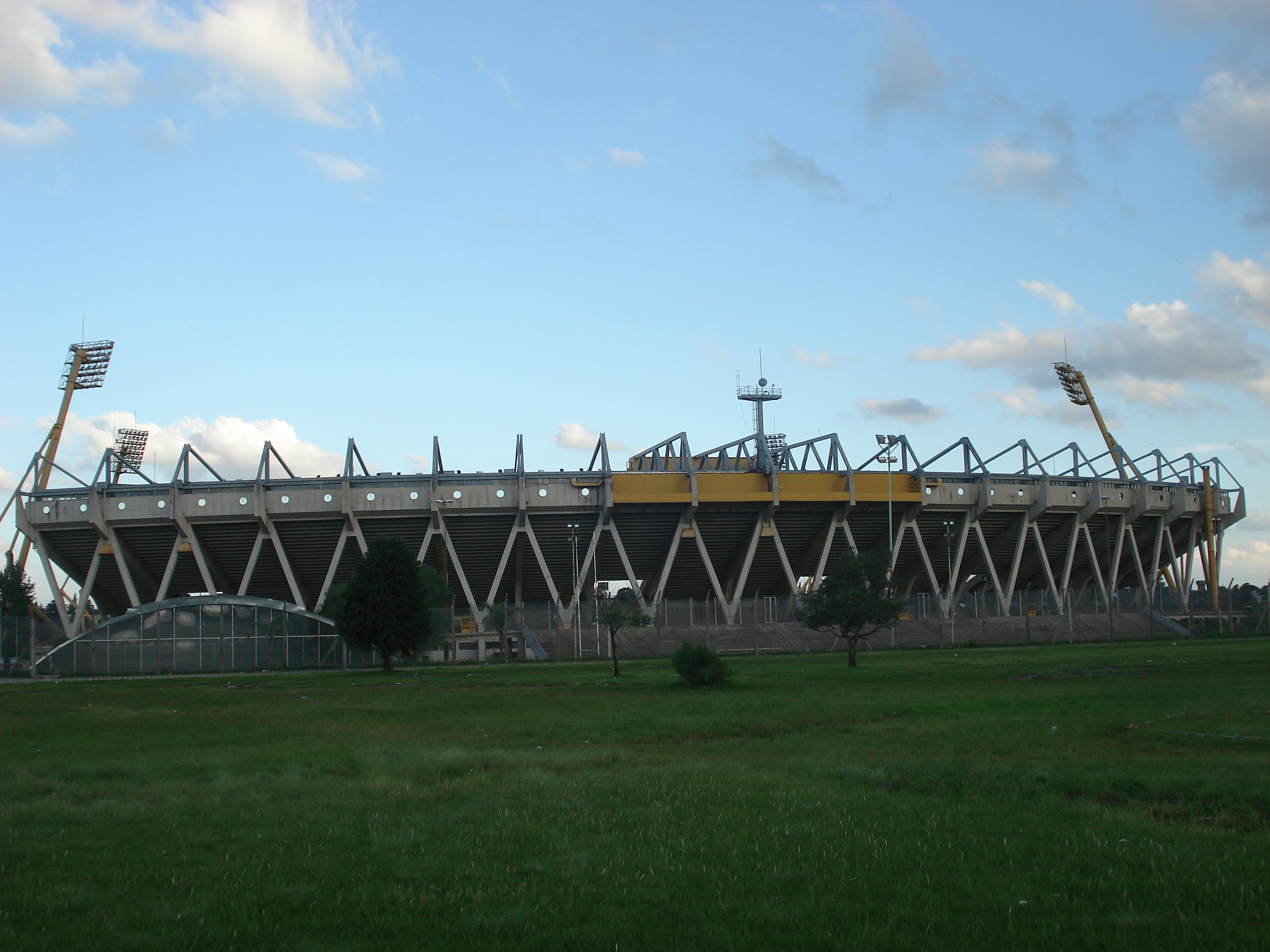 Estadio Cordoba